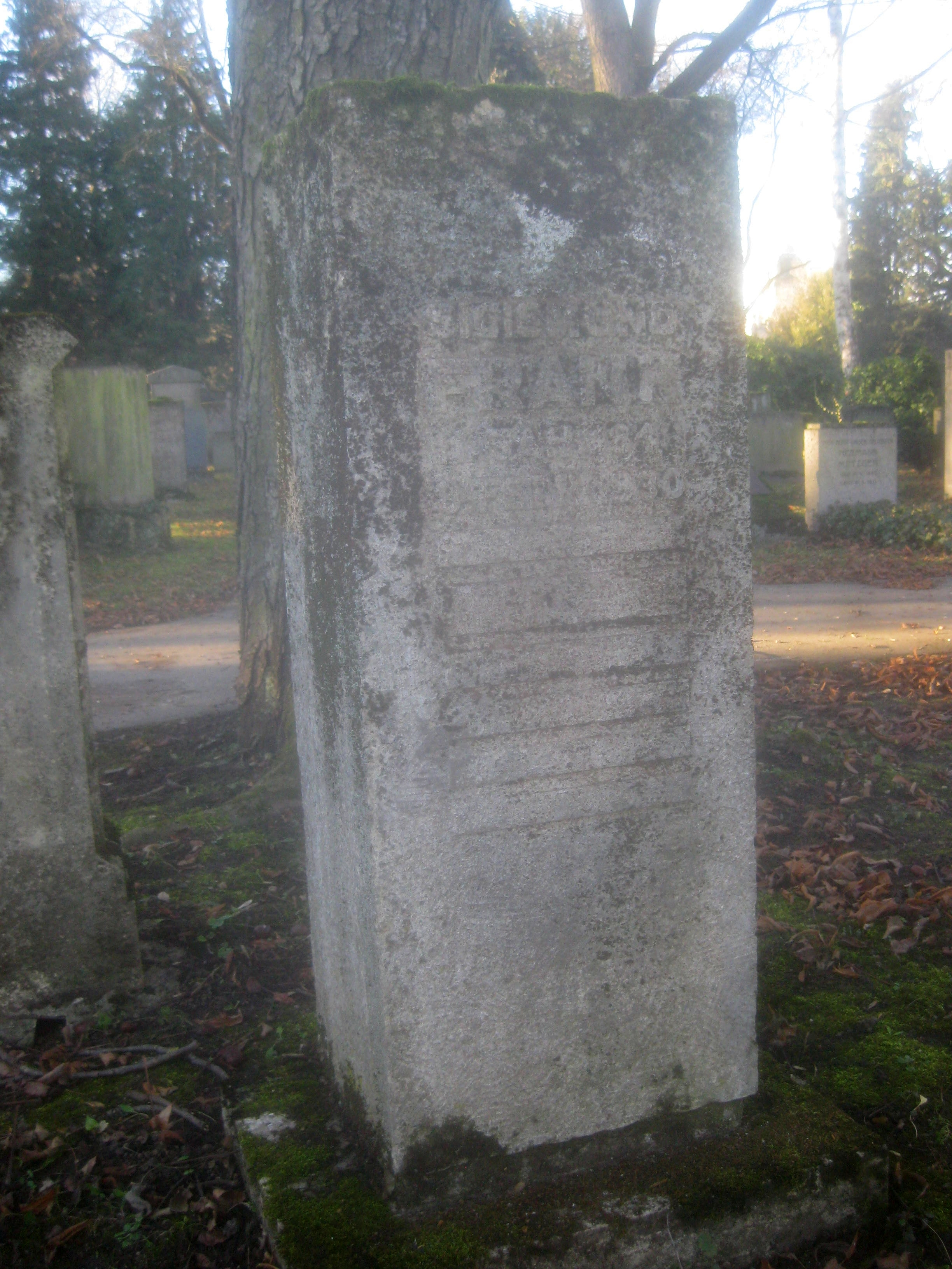 Grab von Sigismund Frank (1848–1930), Bankier, Stuttgart, Vater des Stuttgarter Schriftstellers Bruno Frank, Pragfriedhof, israelitischer Teil, Abteilung 20, Reihe 2 (vom Außenzaun des Friedhofs an gezählt), Grab 58 (letztes Grab vom Haupteingang aus gesehen).